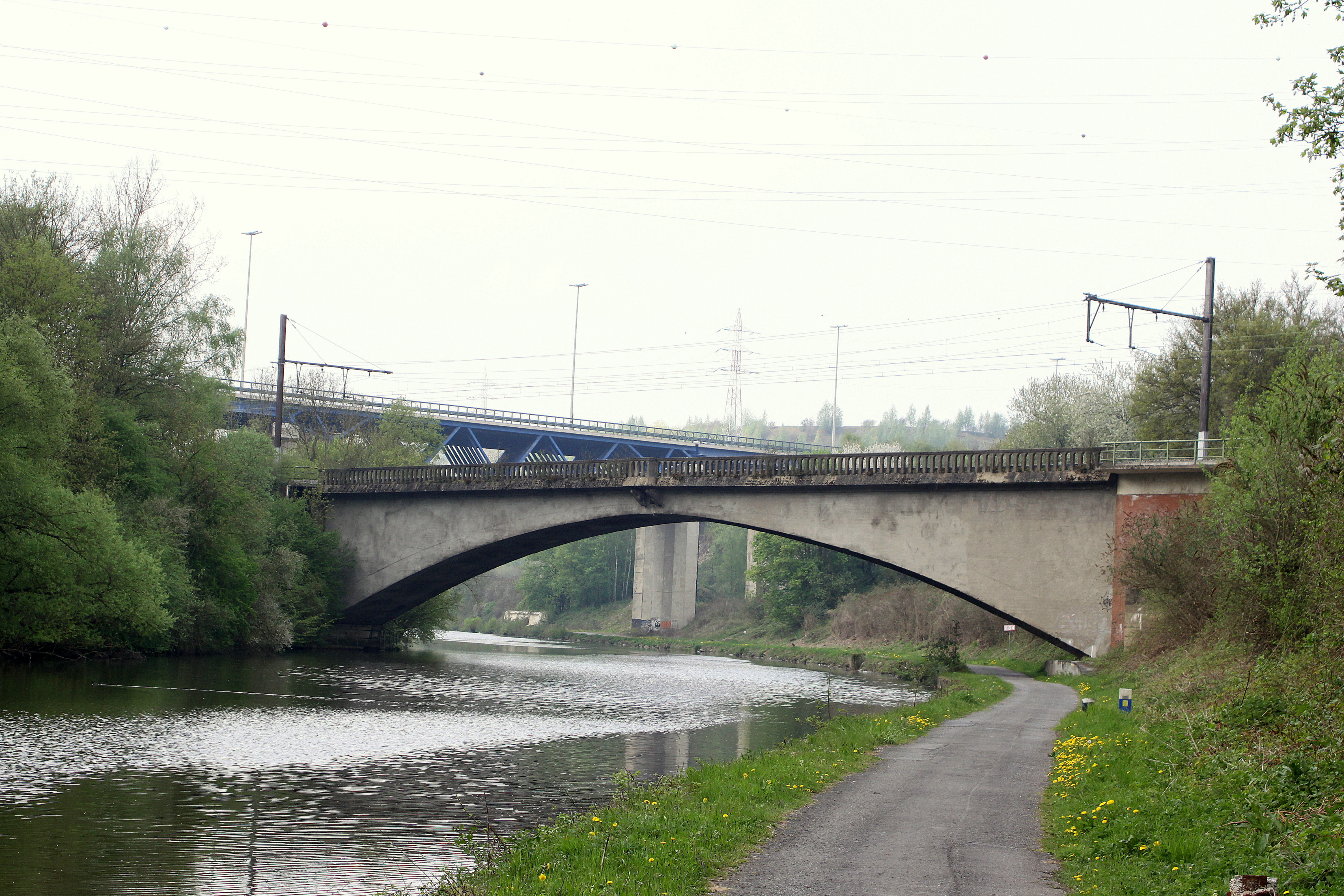 De Pont Candelier bei Landelies